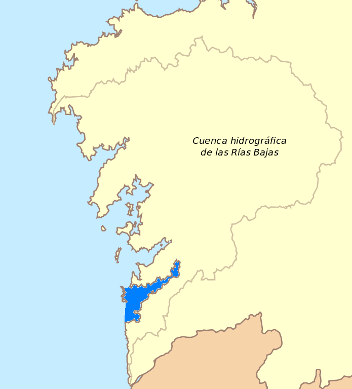 Ría de Vigo